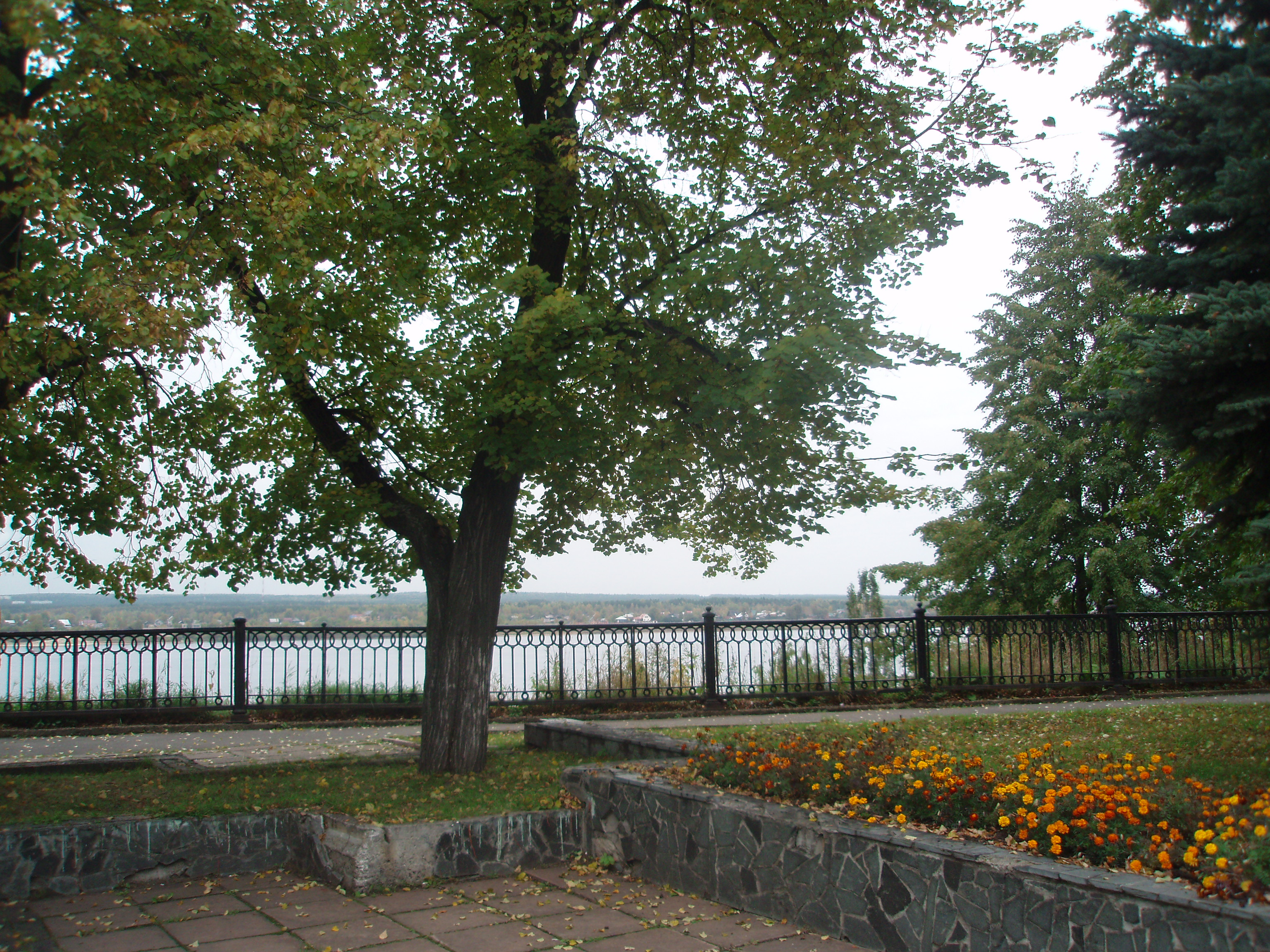 Вид на Каму с площадки сквера им.Ф.М.Решетникова в Перми